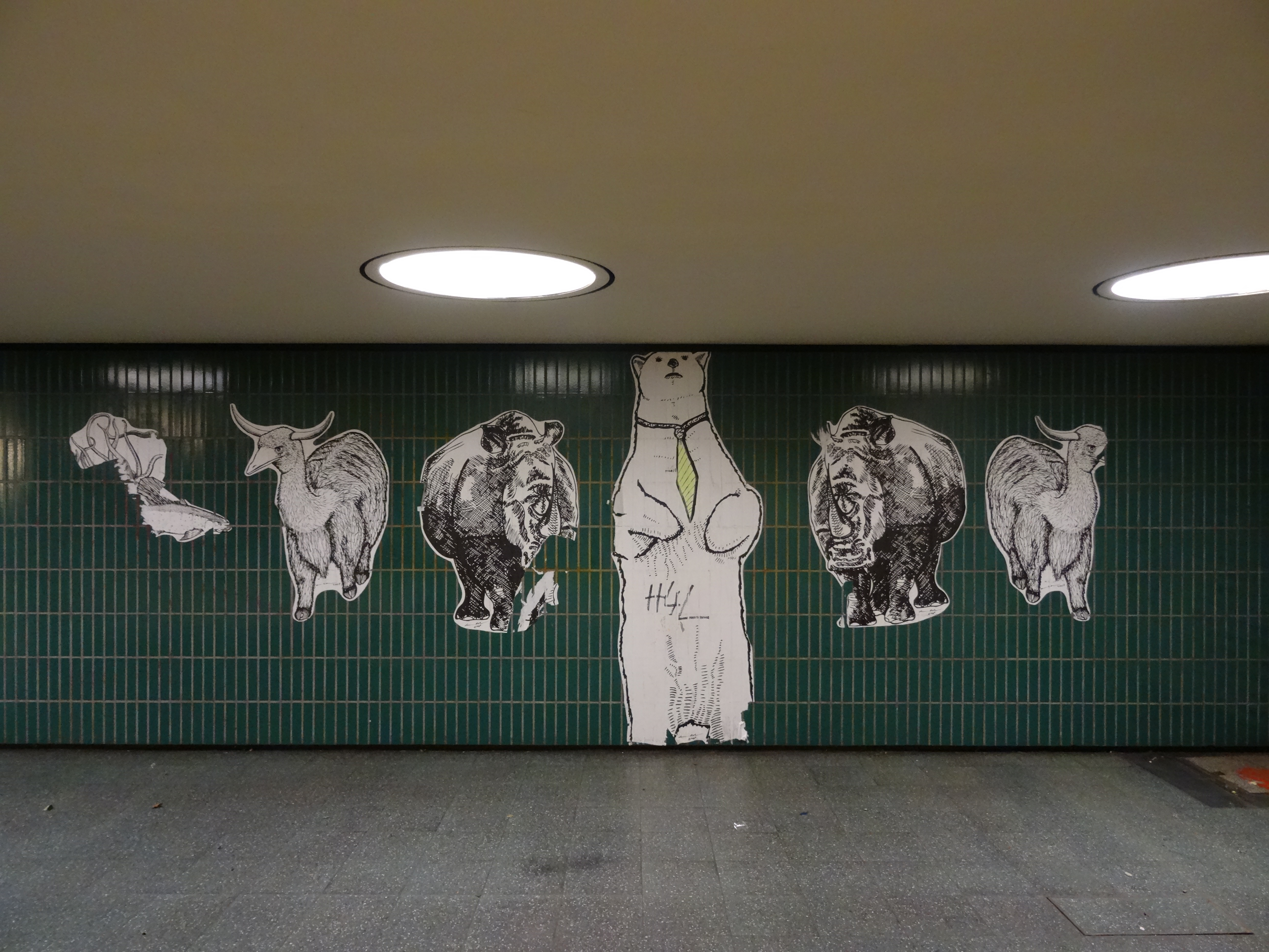 Linie U9 in Steglitz - Stand 01/2015. Der U-Bahnhof soll demnächst komplett umgebaut werden. Erste Veränderungen sind bereits sichtbar: Kugellampen an der Decke und grüne Farbproben.